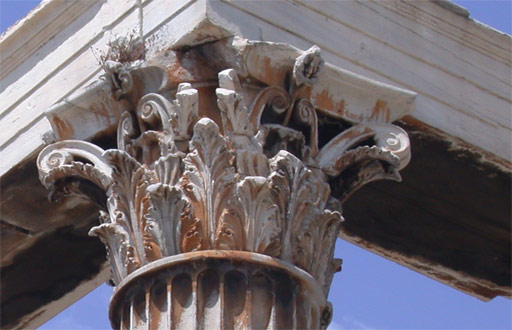 Olympion, Temple de Zeus, Athènes, détail